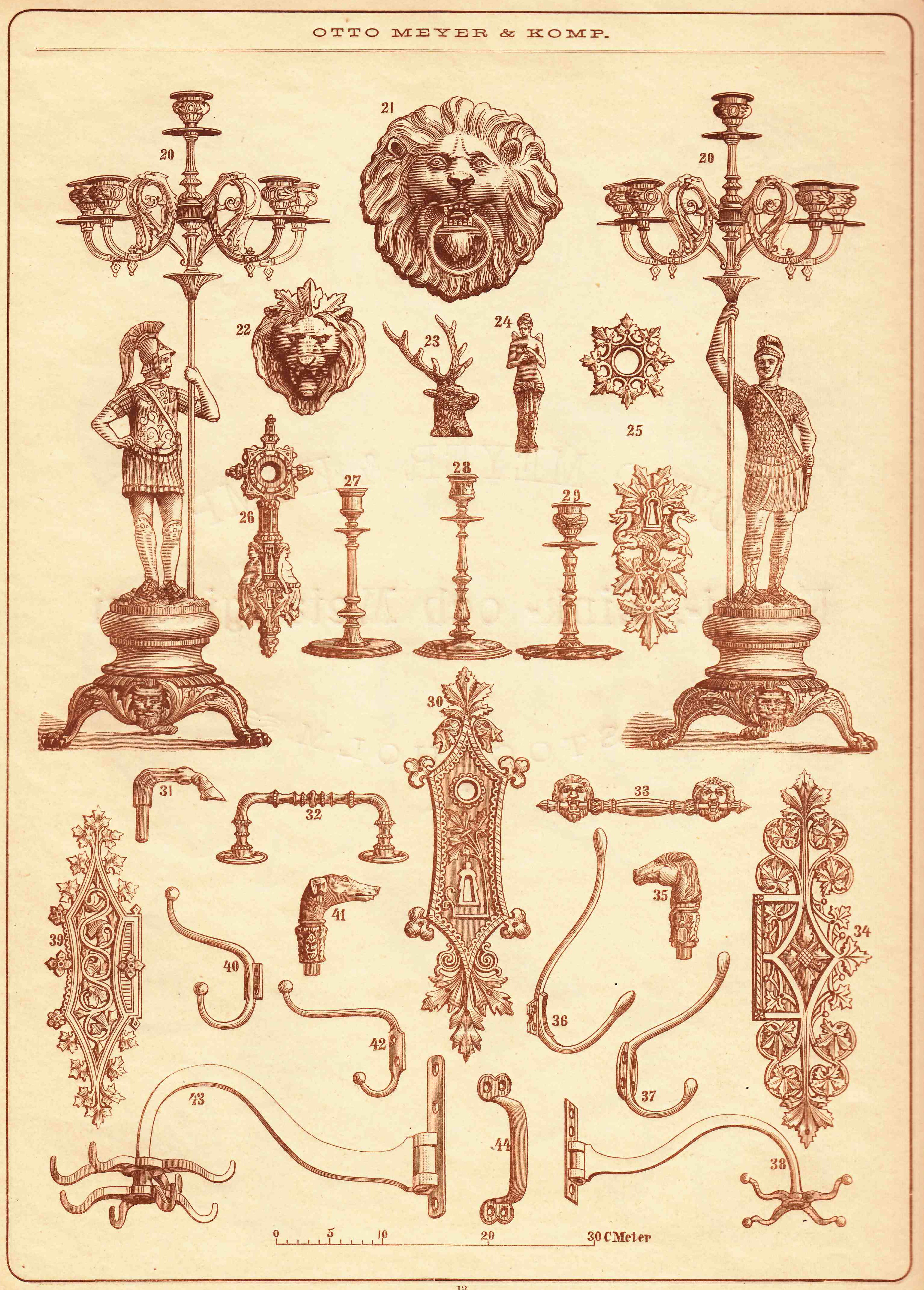 Otto Meyers konstgjuteri, katalogsida